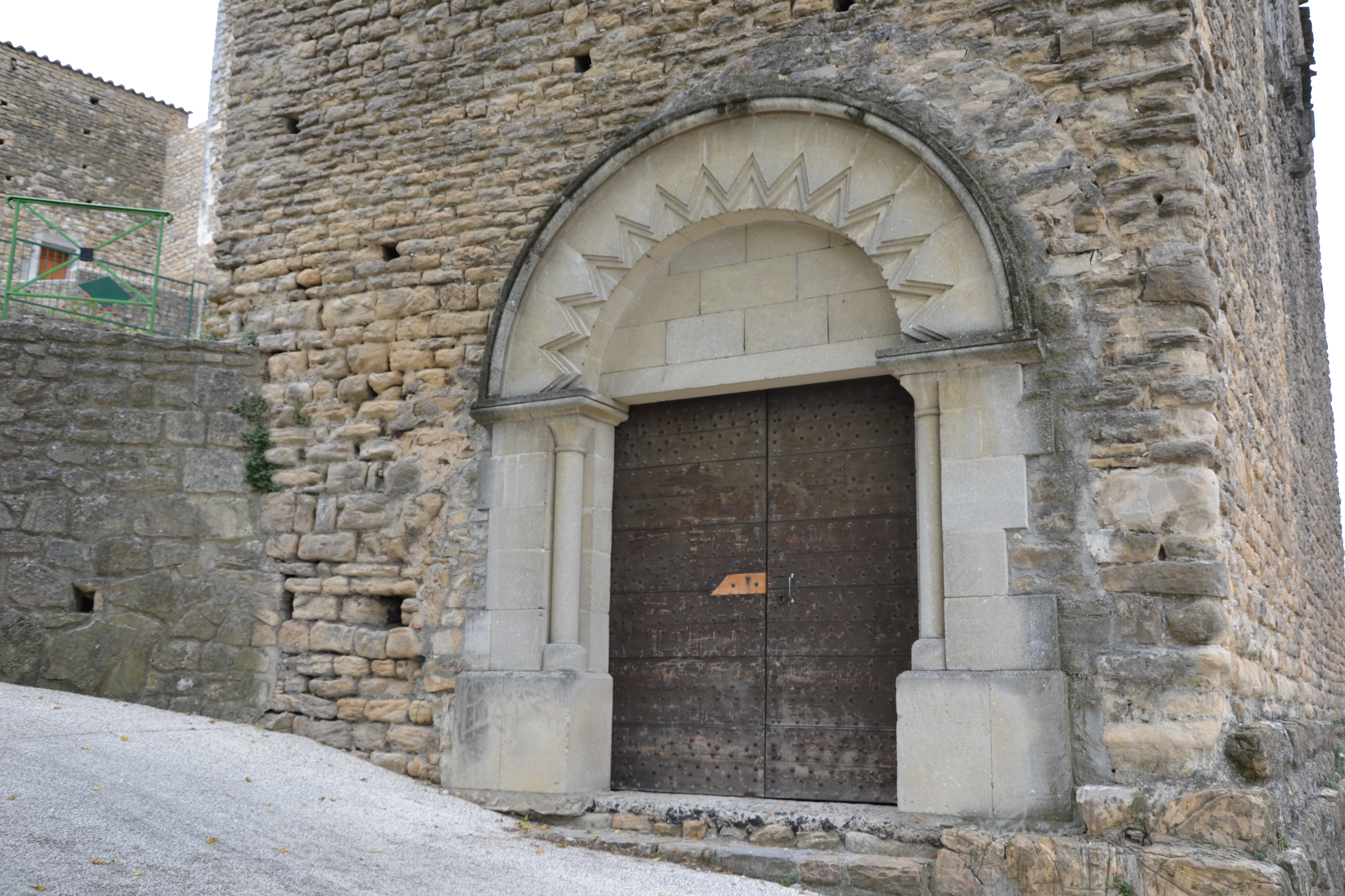 Maison cardinale de Bollène (Inscrit) .